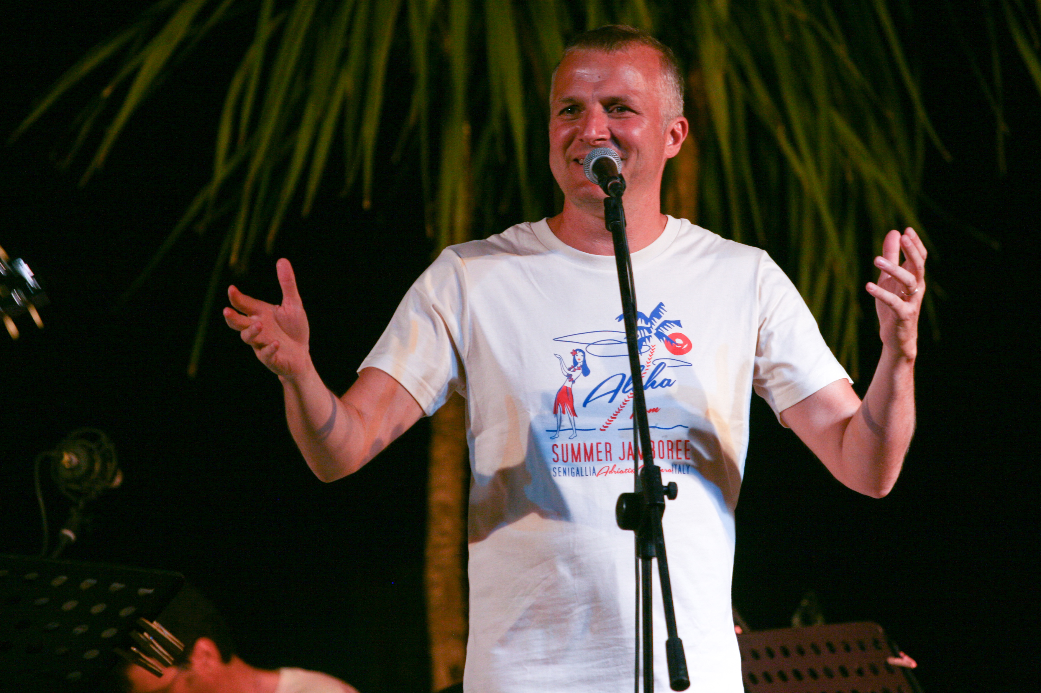 Max Paiella in concerto a Senigallia durante la festa hawaiana del Summer Jamboree